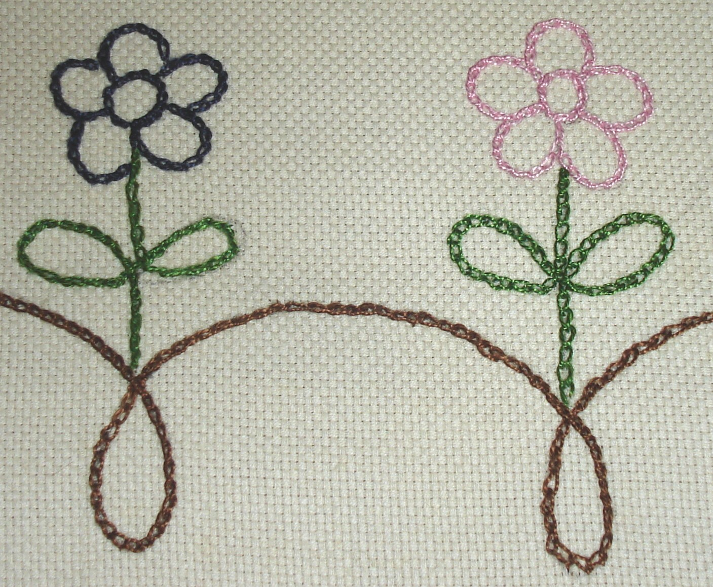 Gesticktes Blumenmotiv, Kettenstich auf Kanevas.